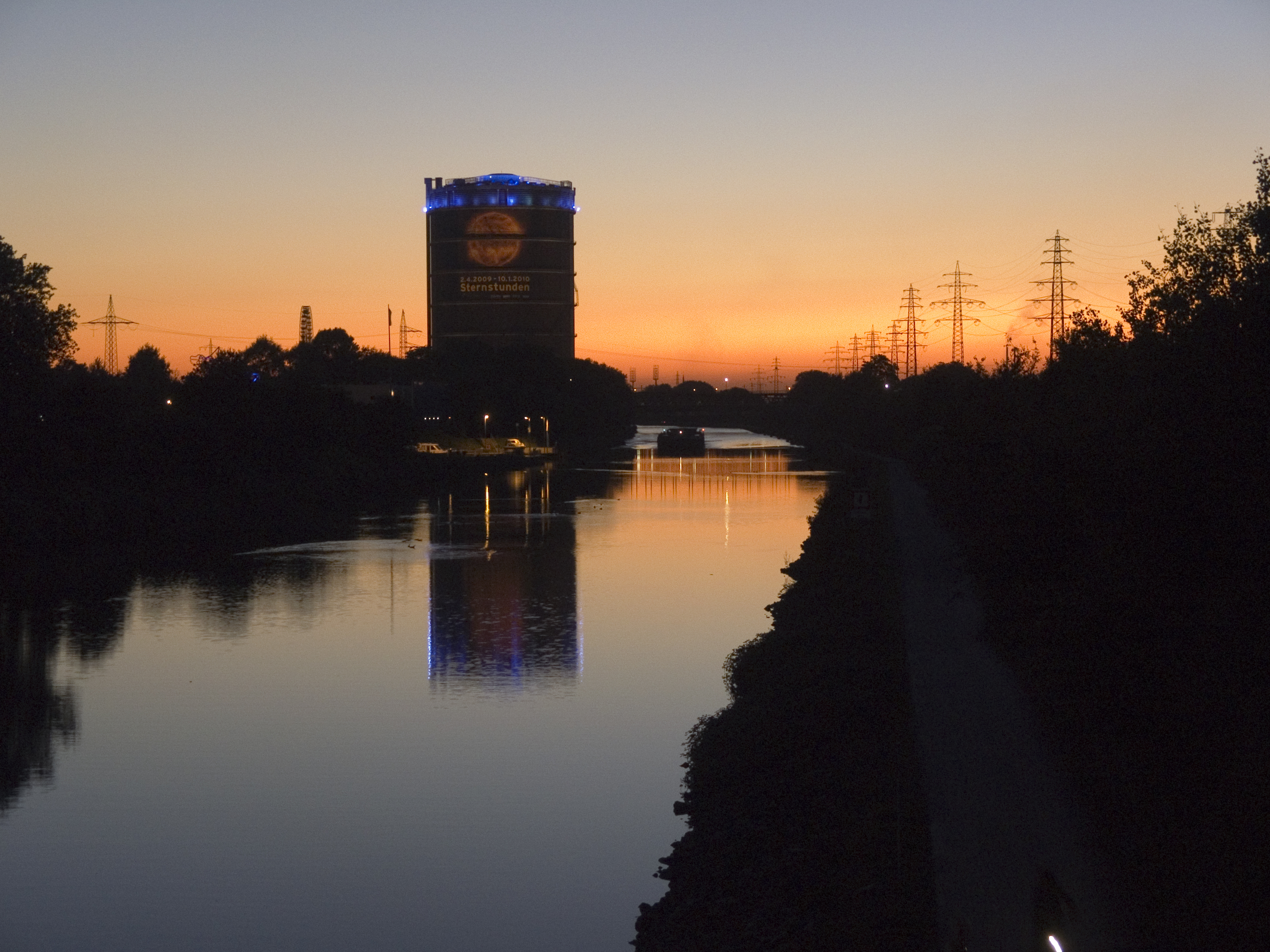 Газометр и река Эмшер на закате (Северный Рейн-Вестфалия, Оберхаузен)